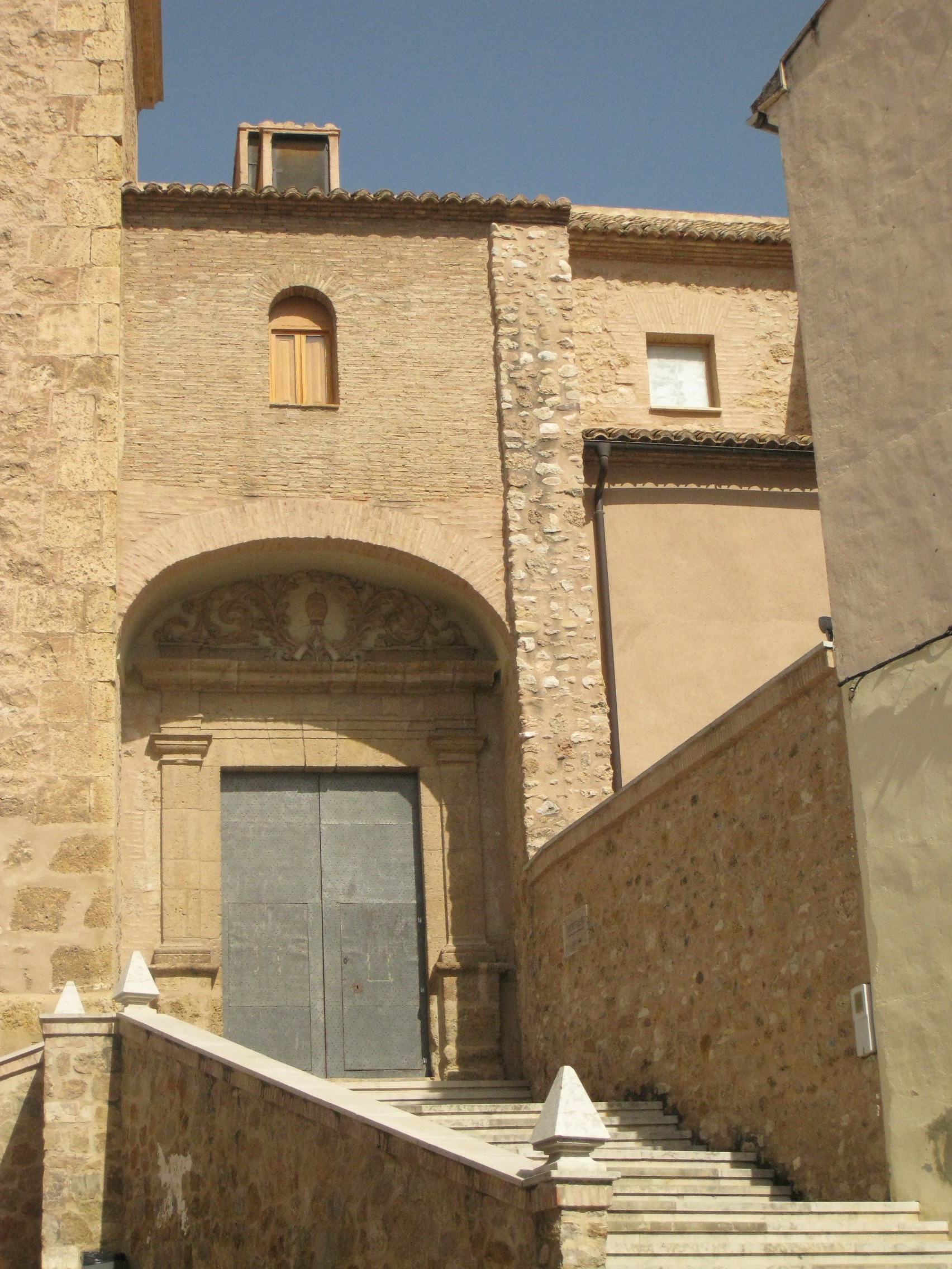 Església de Sant Joaquim i Santa Anna (Sogorb) 07.104-005.